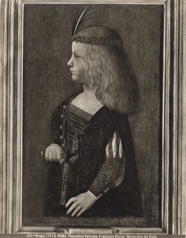 Roma. Pinacoteca vaticana. Francesco Sforza; Bernardino dei Conti